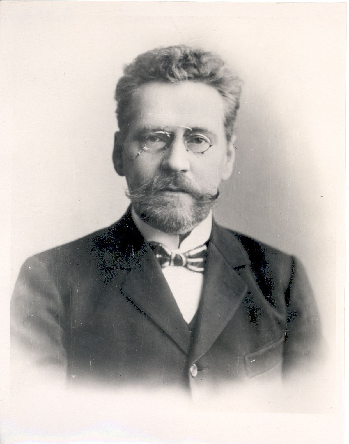 Eduard Bornhöhe